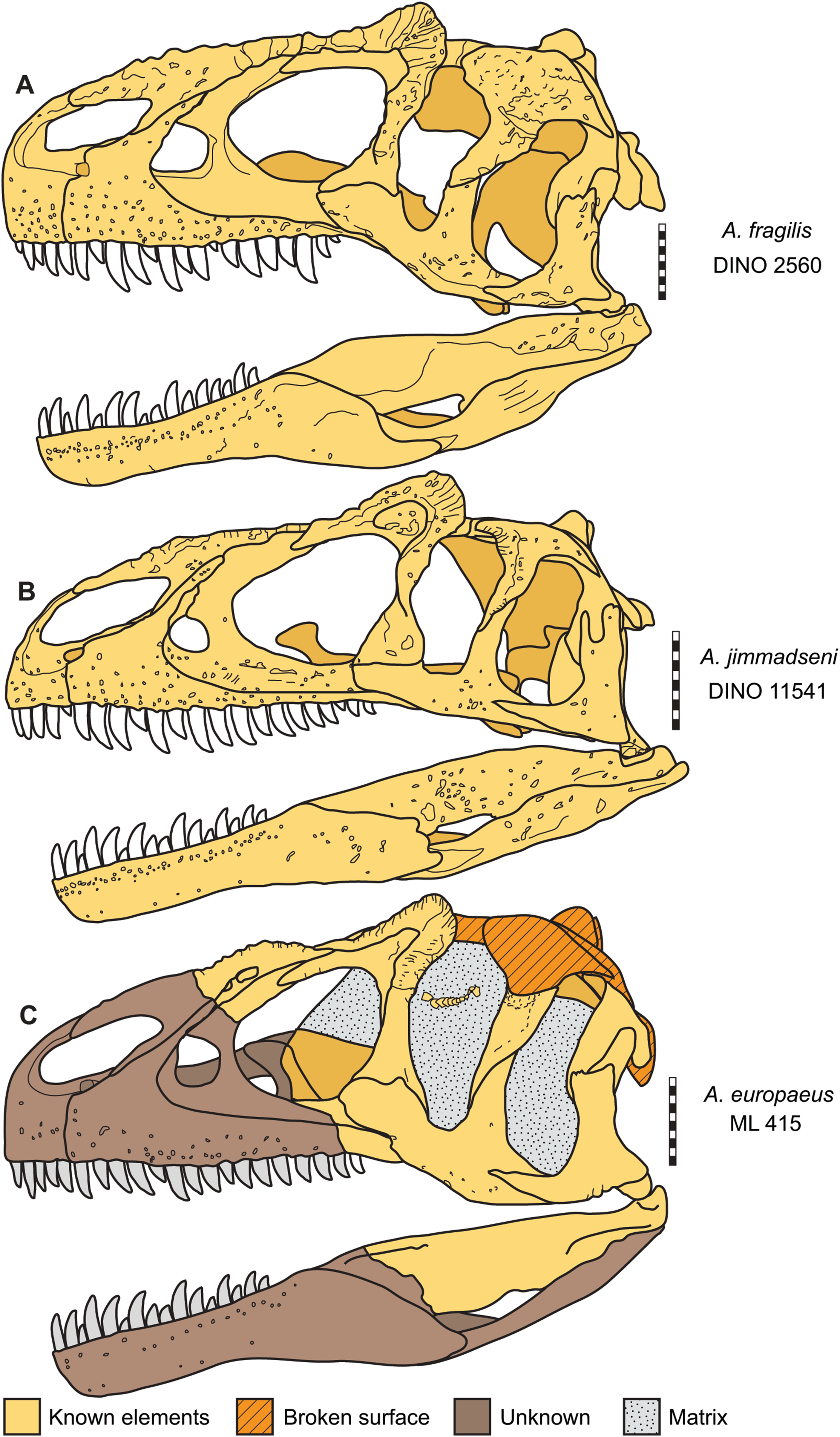 Skulls of Allosaurus in left lateral view. (A) Allosaurus fragilis (DINO 2560). (B) Allosaurus jimmadseni (DINO 11541). (C) Allosaurus europeaus (ML 415). Scale bars equal 10 cm.